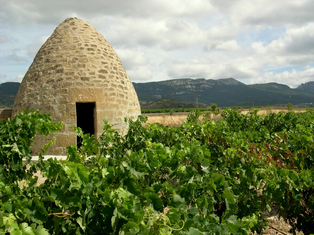 Se usaba, y supongo que se sigue haciendo, para vigilar los viñedos y como refugio para los agricultores en caso de tormentas. --Tomada de camino a Laguardia, desde Samaniego (A-124).